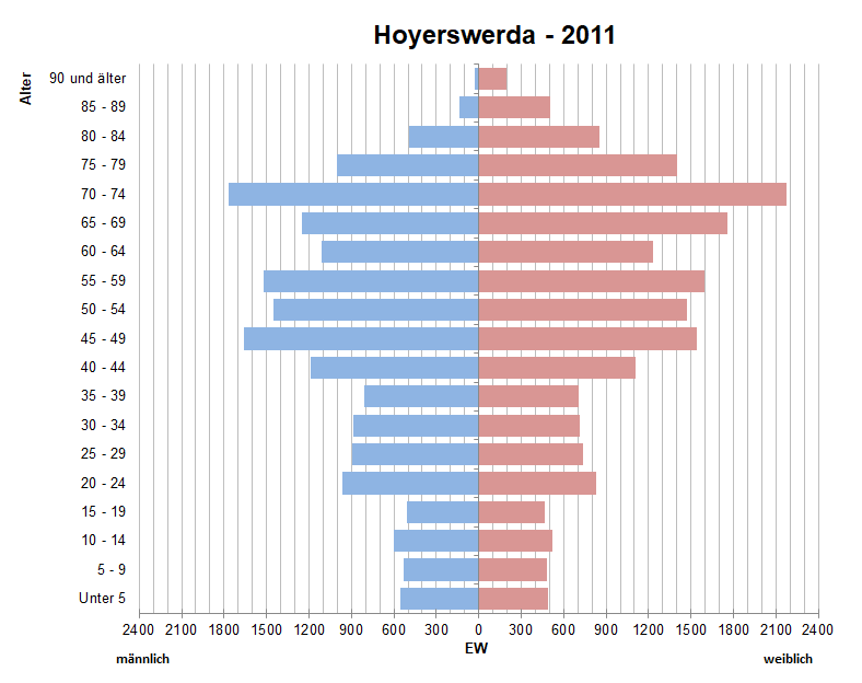 Bevölkerungspyramide der Stadt Hoyerswerda nach Zensus 2011.